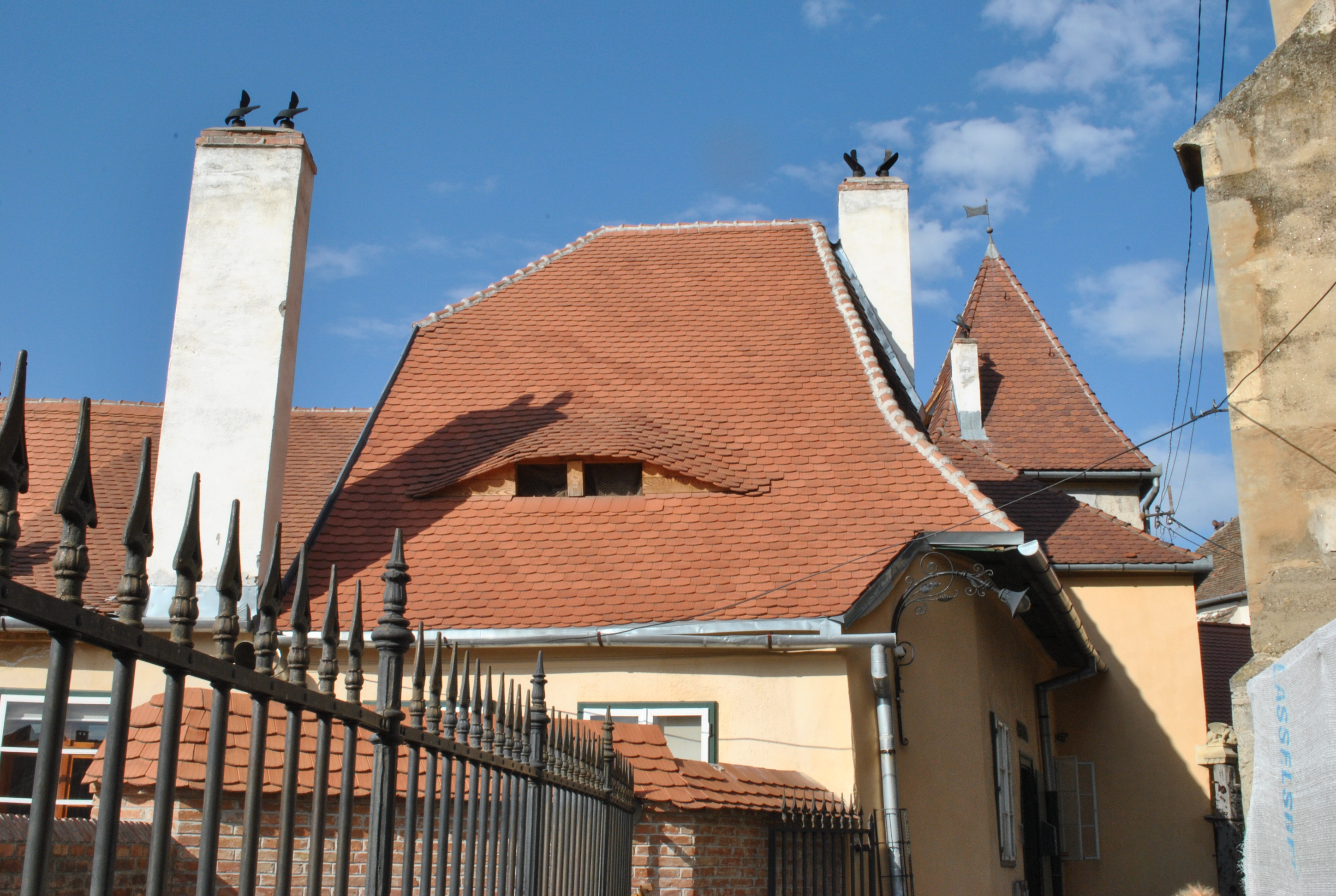 Clădirea "Butoiul de Aur", cu turn de apărare înglobat, azi locuință, sec. XIII, sec. XV, 1542, 1860